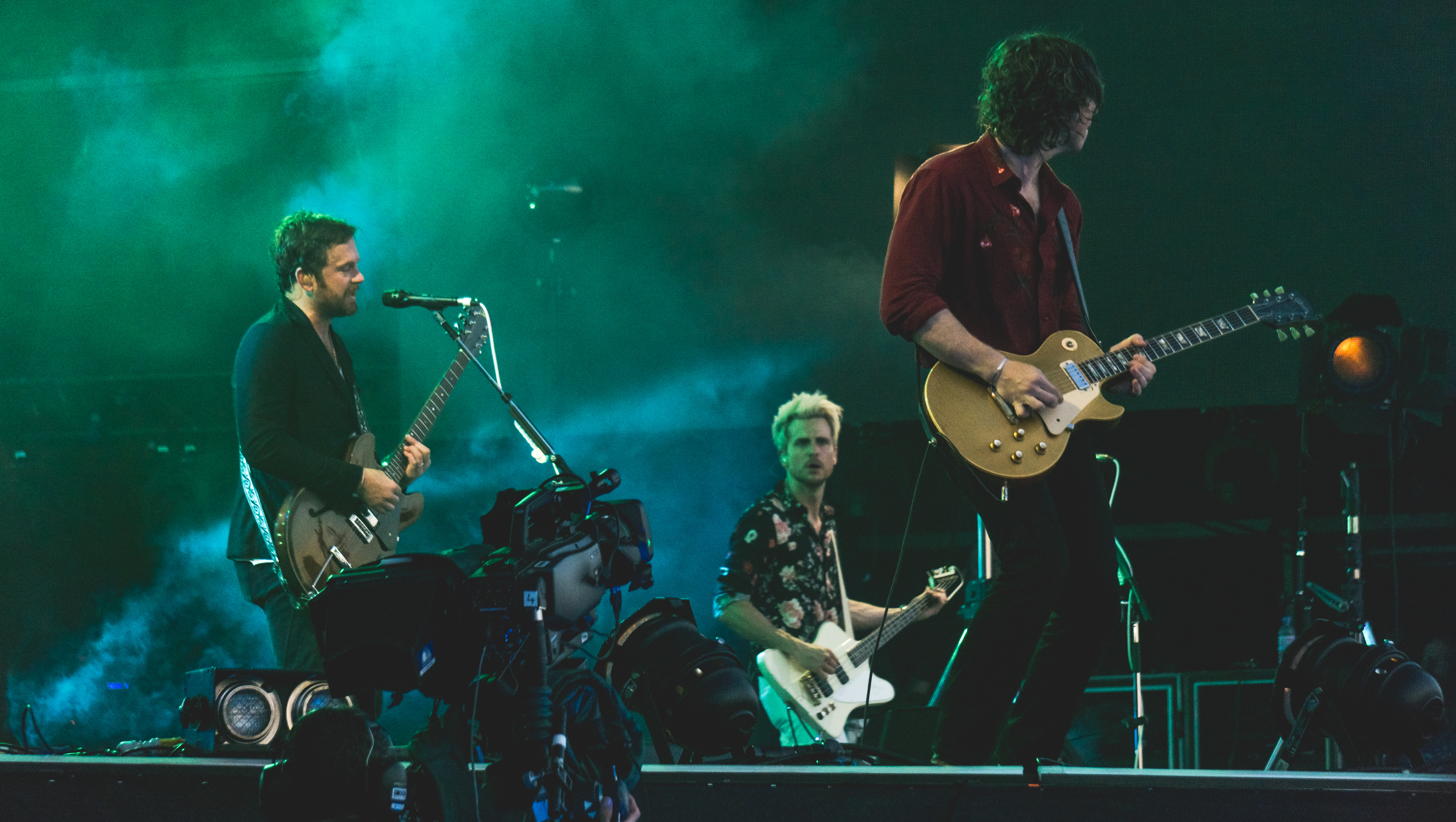 KoLHydePark060717-12